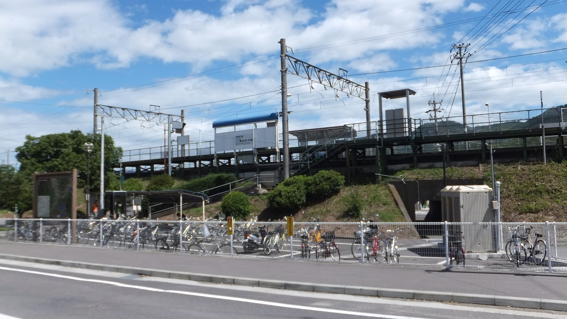 香川県坂出市府中町 讃岐府中駅